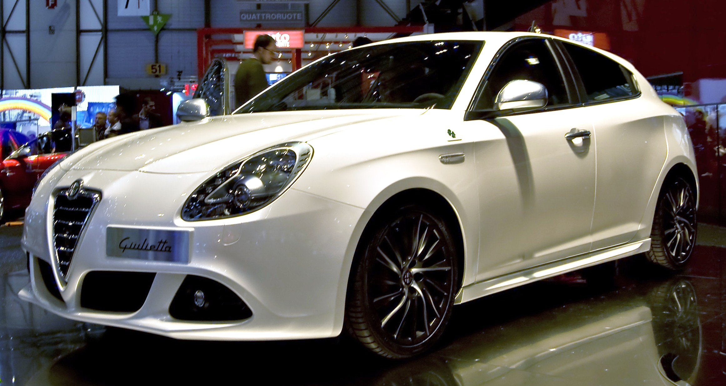 Alfa-Romeo Giulietta en el Salón de Ginebra 2010.